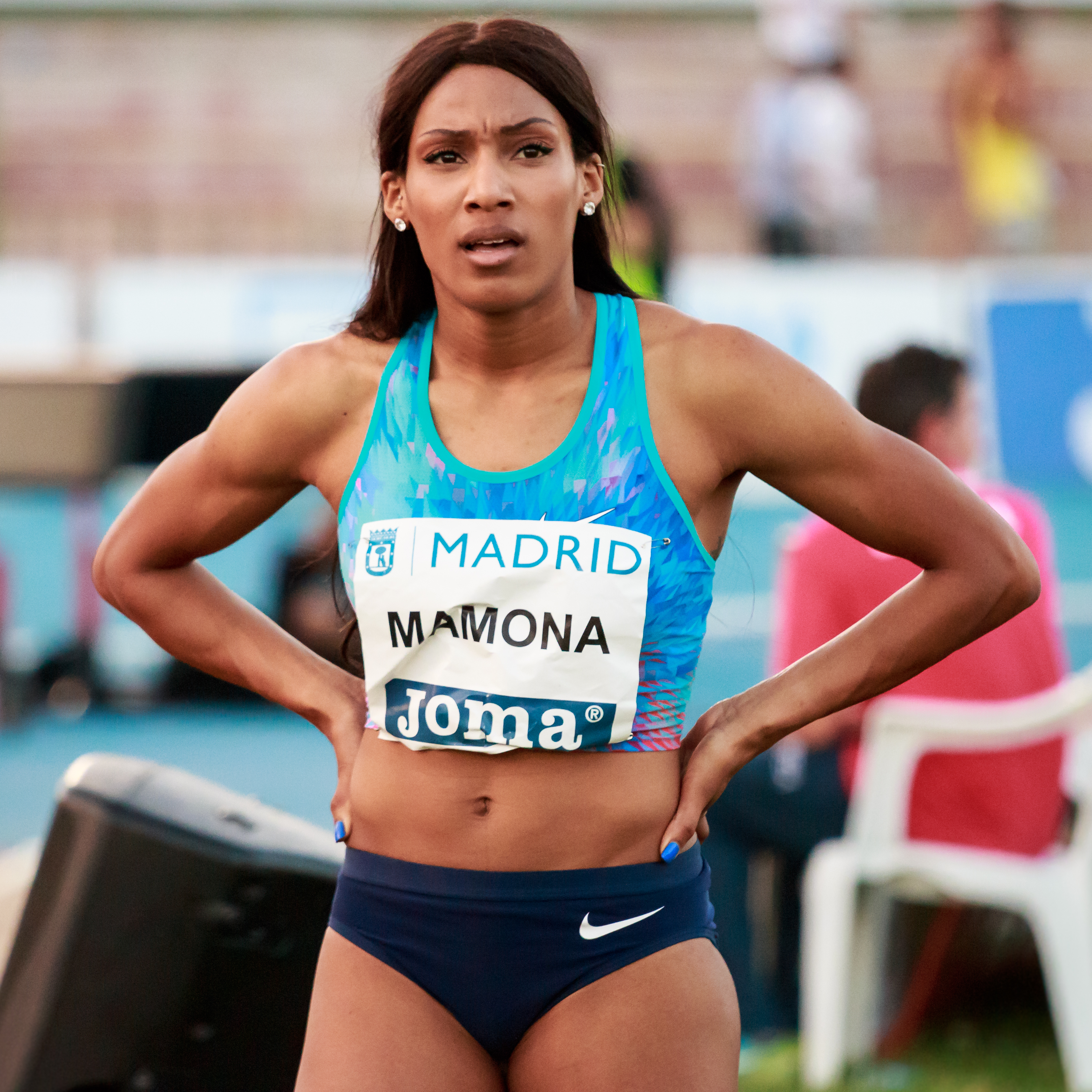 Patrícia Mamona (POR). Triple salto. IAAF World Challenge. Meeting Madrid 2017. Moratalaz, Madrid.